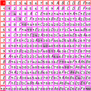 Hexadecimal multiplication table